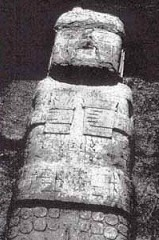 Monolito Bennet o Estela Pachamama el día de su descubrimiento en junio de 1932